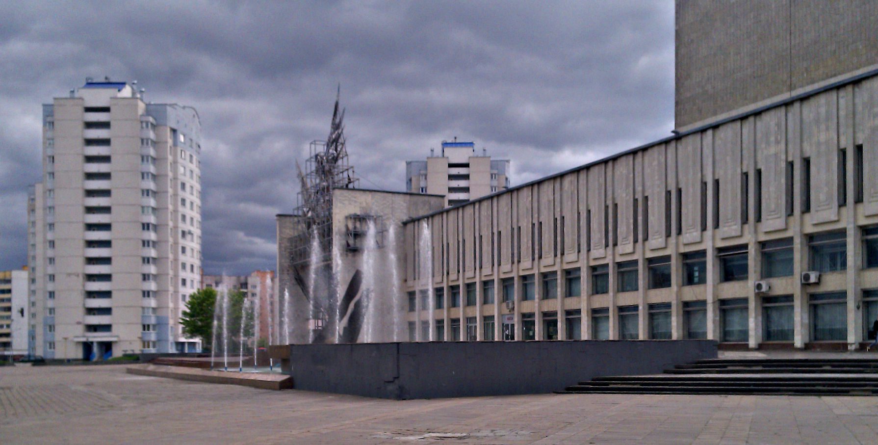 Дворец Искусств в городе Бобруйске (Белоруссия)